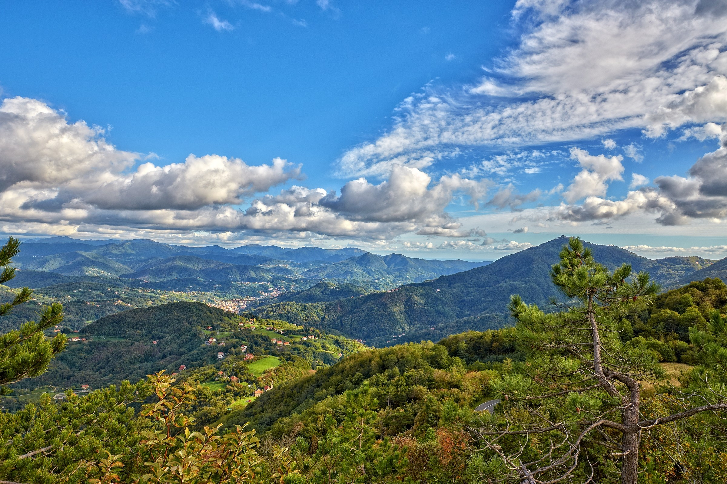 Val Verde